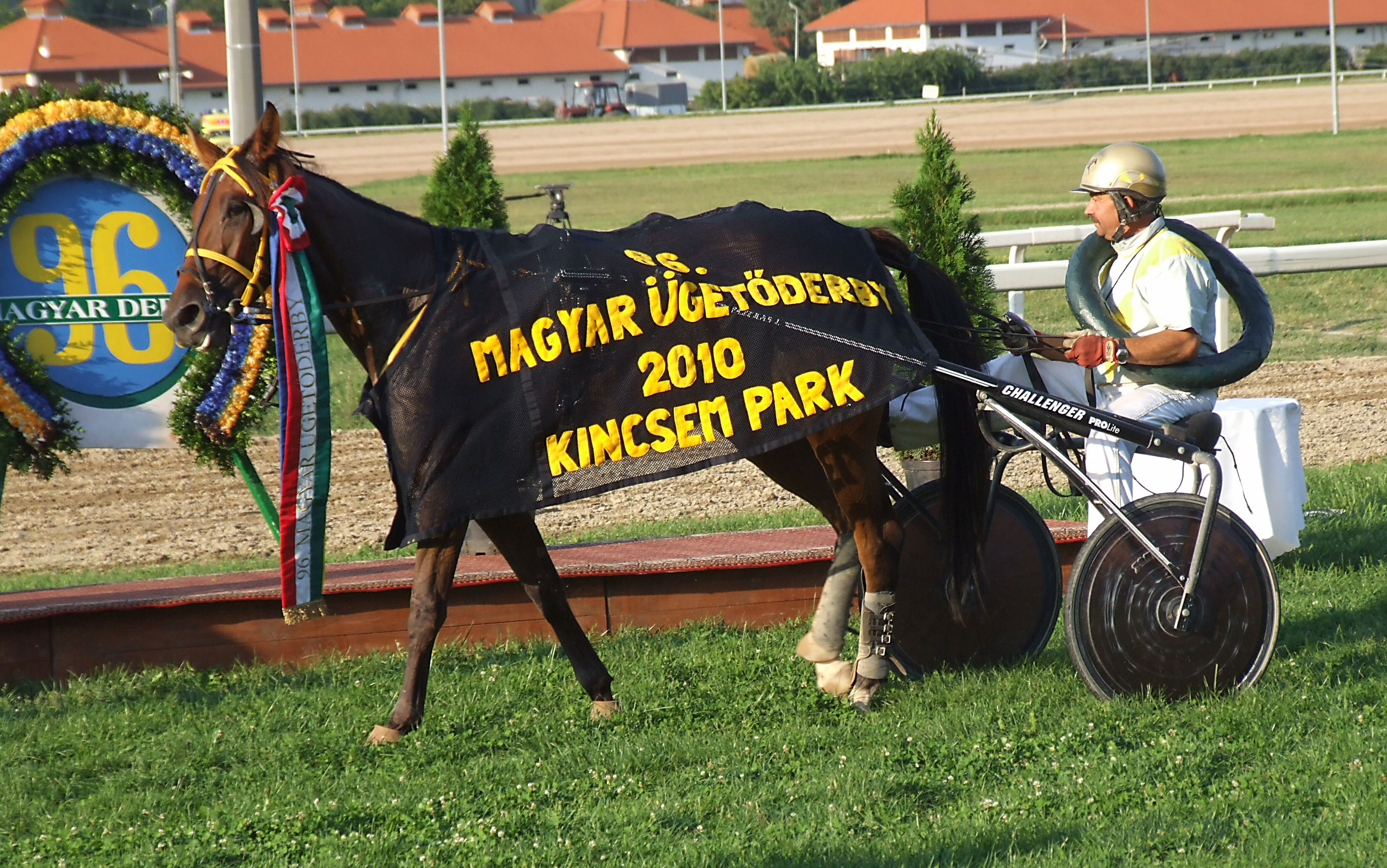 2010-es Magyar Ügetőderby győztes lova Naná, hajtója Fazekas Imre